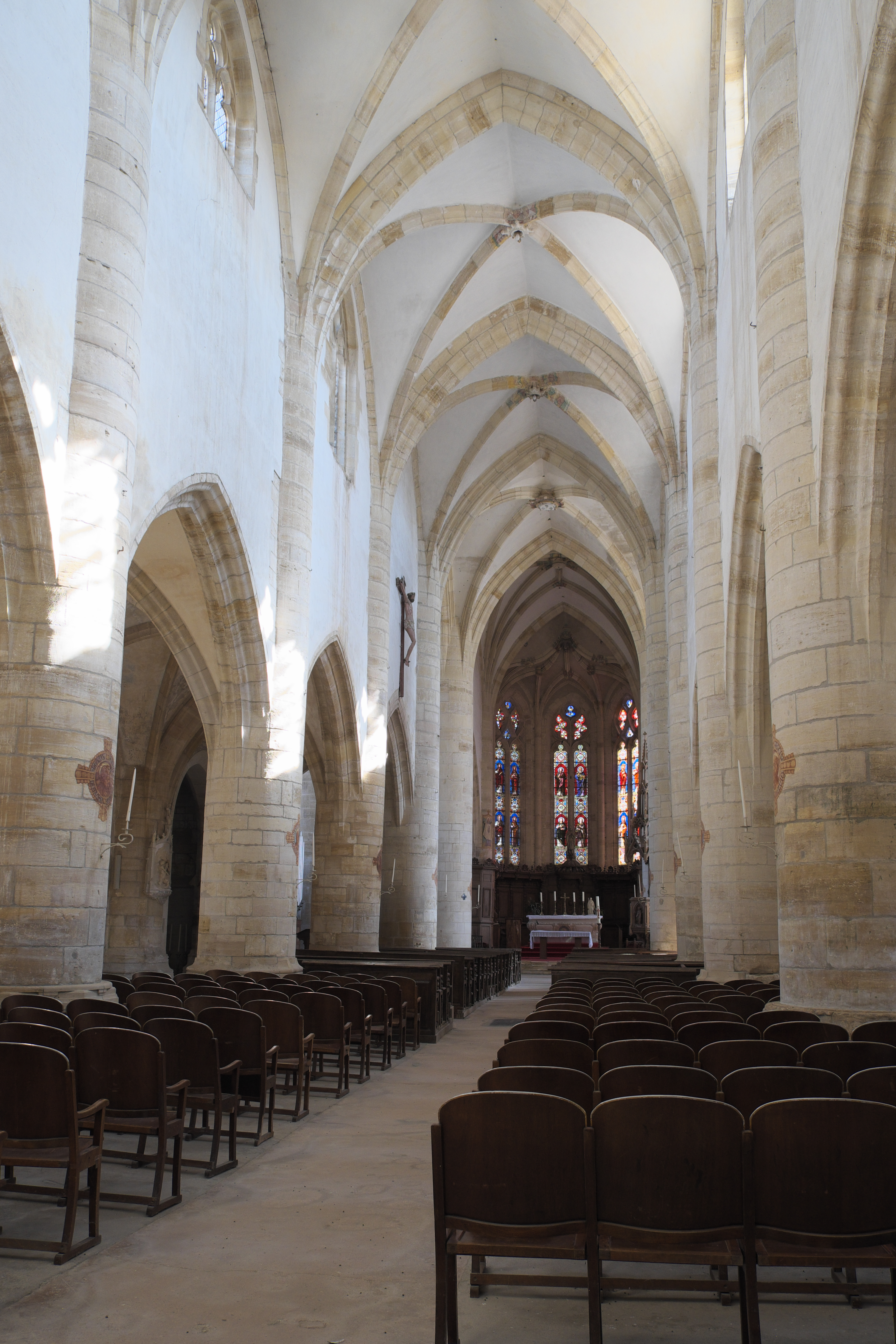 Katholische Kirche Saint-Louvent in Rembercourt-Sommaisne im Département Meuse (Lothringen) (Region Grand Est/Frankreich), Innenraum